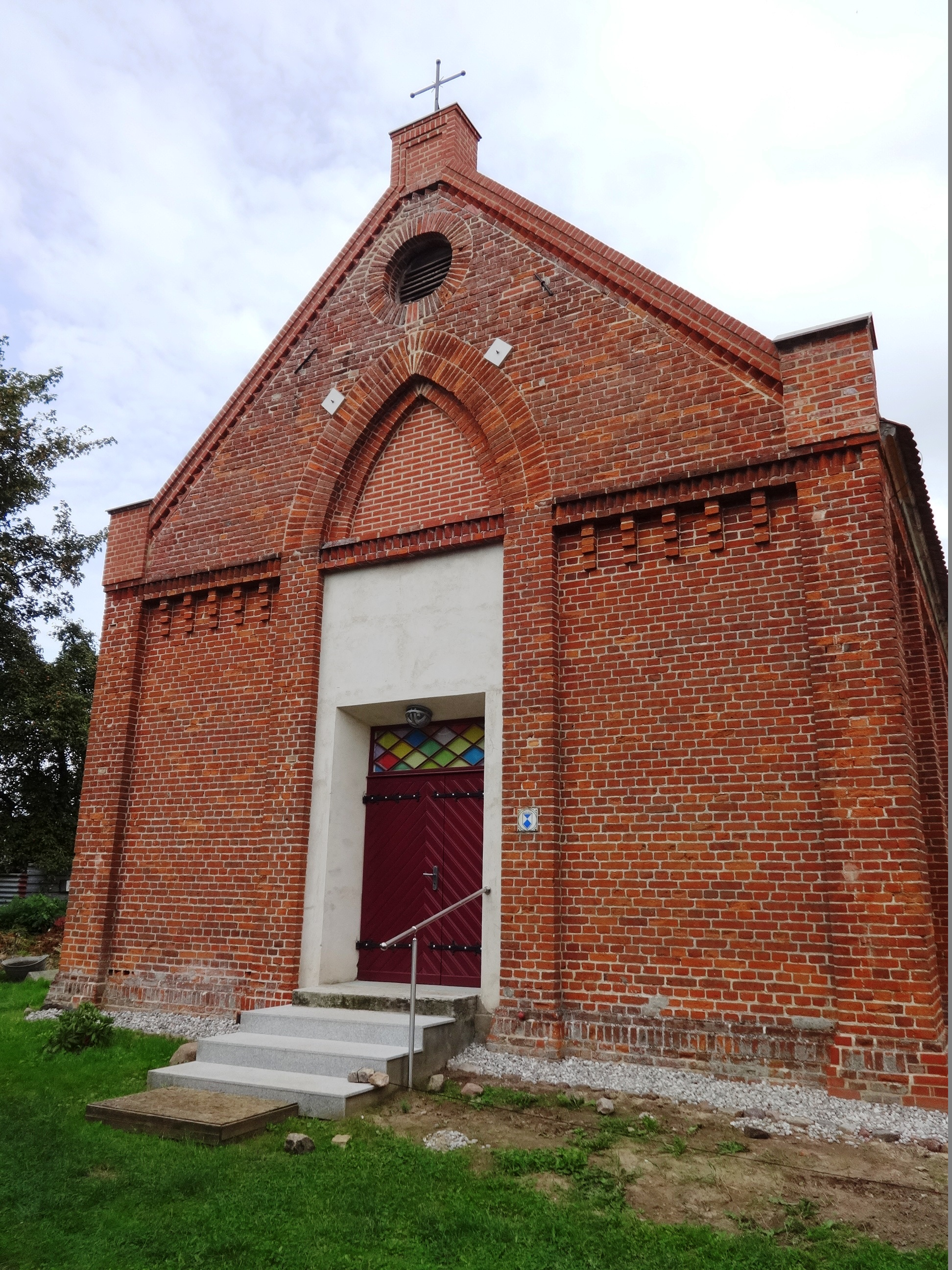 Kapelle in Alt Pansow, Ortsteil von Dersekow in Mecklenburg-Vorpommern